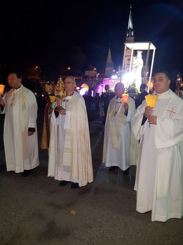 Il Reliquiario della Madonna delle Lacrime di Siracusa a Lourdes